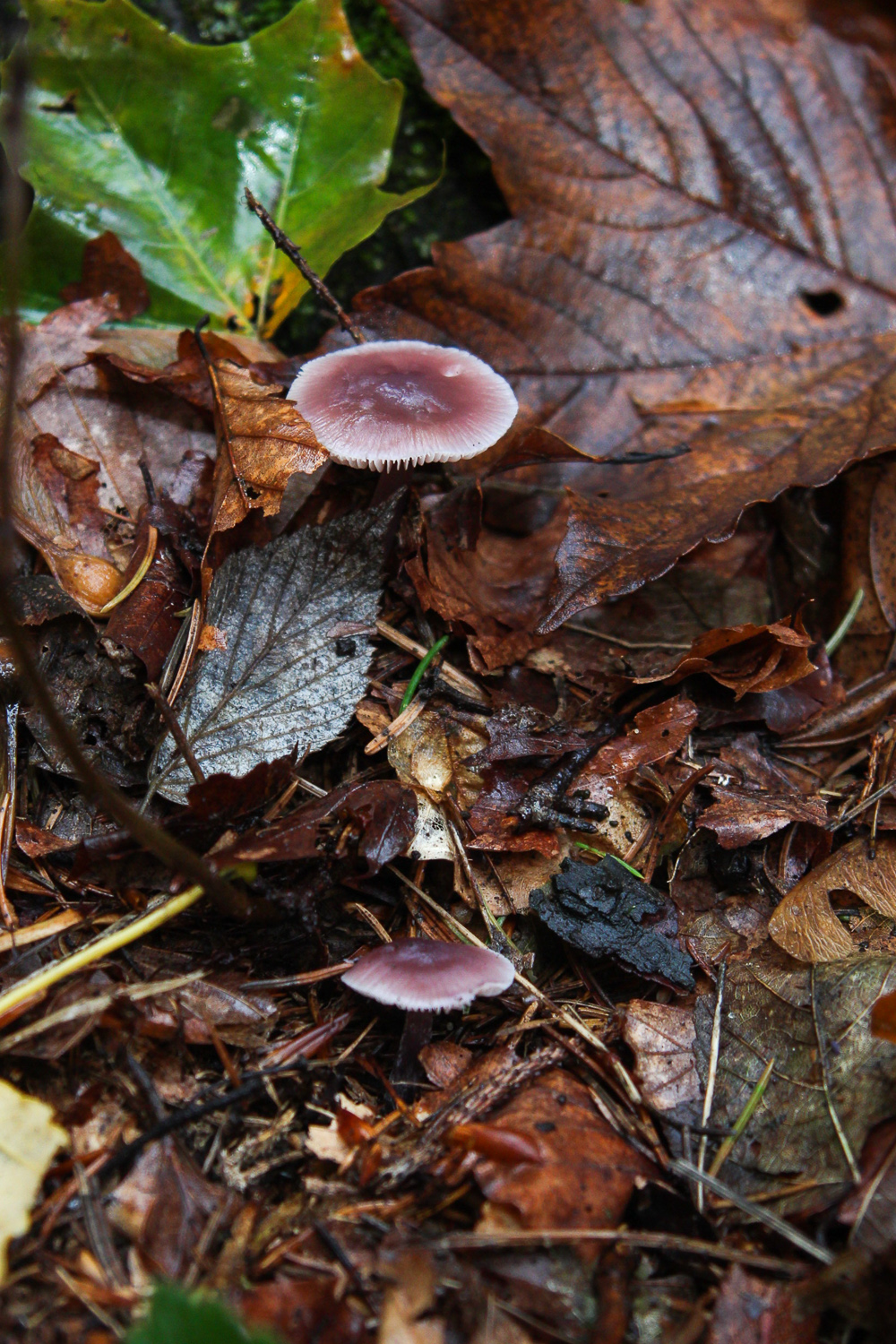 Helmovka dvojvonná (Mycena diosma) na svazích Růžovského vrchu.